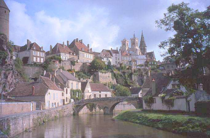 Semur-en-Auxois (Côte-d'Or) Photo prise le 17/09/2000 par Pierre Lavaurs. Publiée sur son site avec la note suivante : À propos du copyright : Ce site n'est pas mon gagne-pain et je n'ai aucun usage des droits de propriété intellectuelle que je peux posséder sur celui-ci. En conséquence, vous êtes libres de faire l'usage que vous souhaitez du matériel y figurant, avec ou non indication de votre source selon votre fantaisie.